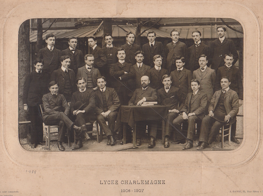 Classe du lycée Charlemagne 1906-1907. Photo par Jules David - Rangée du haut de gauche à droite, 3ème : Léon Moussinac, 4ème : Louis Delluc.